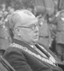 Der jubelnde Empfang des Reichspräsidenten von Hindenburg in Mainz! Reichspräsident von Hindenburg mit dem Mainzer Oberbürgermeister Dr. Külp.